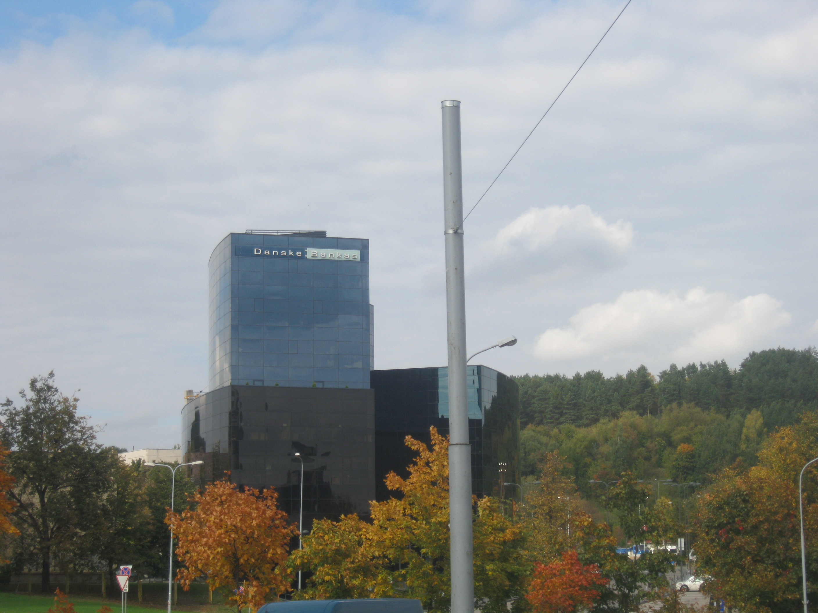 Vilnius